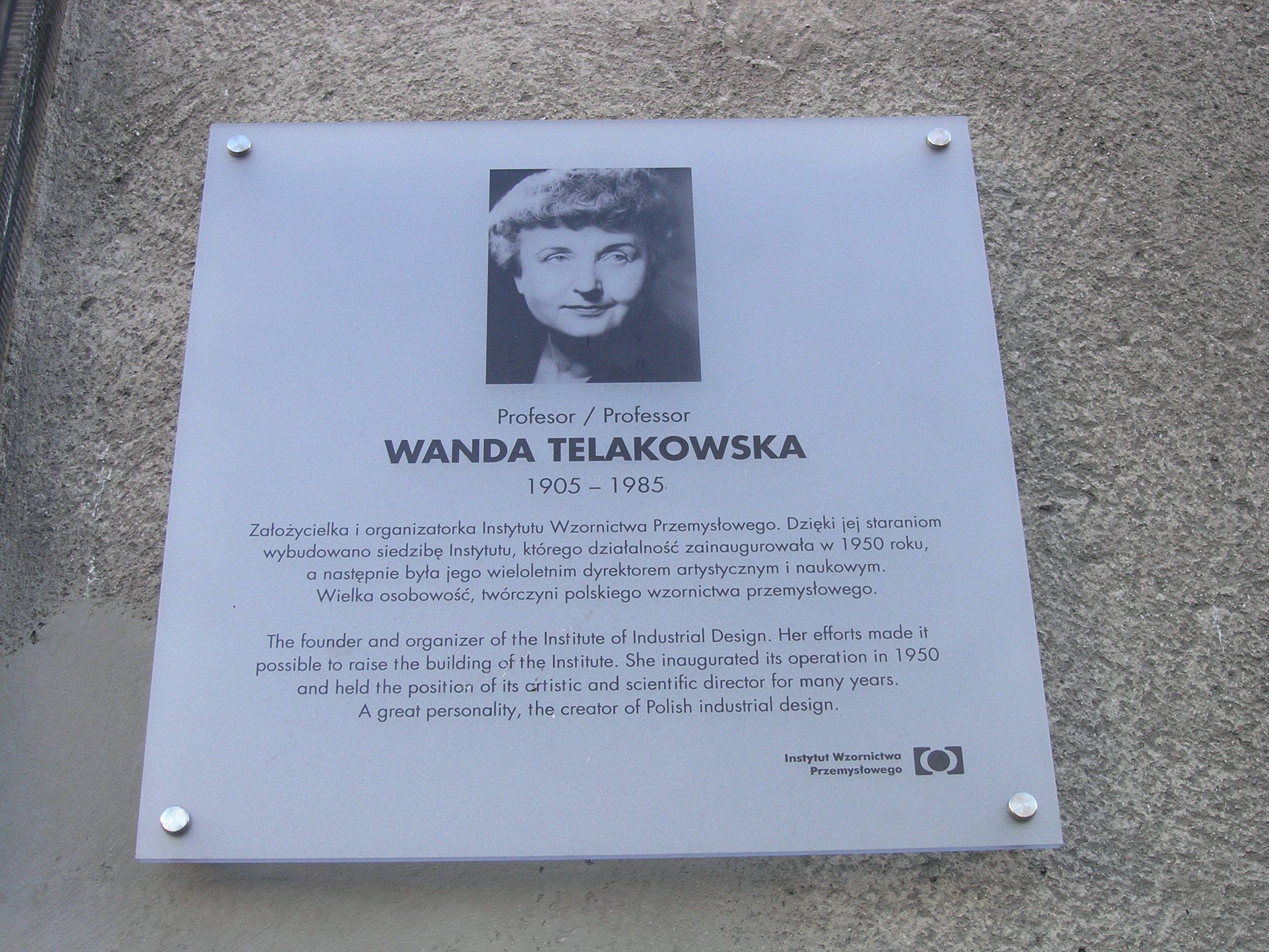 Tablica informująca o patronkę ulicy umieszczona na budynku Instytutu Wzornictwa Przemysłowego przy ulicy Wandy Telakowskiej w Warszawie.